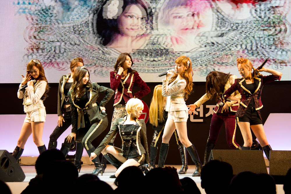 Lg전자가 3월 31일, 4월 1일 양일간 서울 잠실동 롯데월드 아이스링크에서 'lg 시네마3d 월드페스티벌'을 성황리에 개최했다. ※ LG전자 뉴스룸 에서 관련 보도자료를 확인실 수 있습니다.